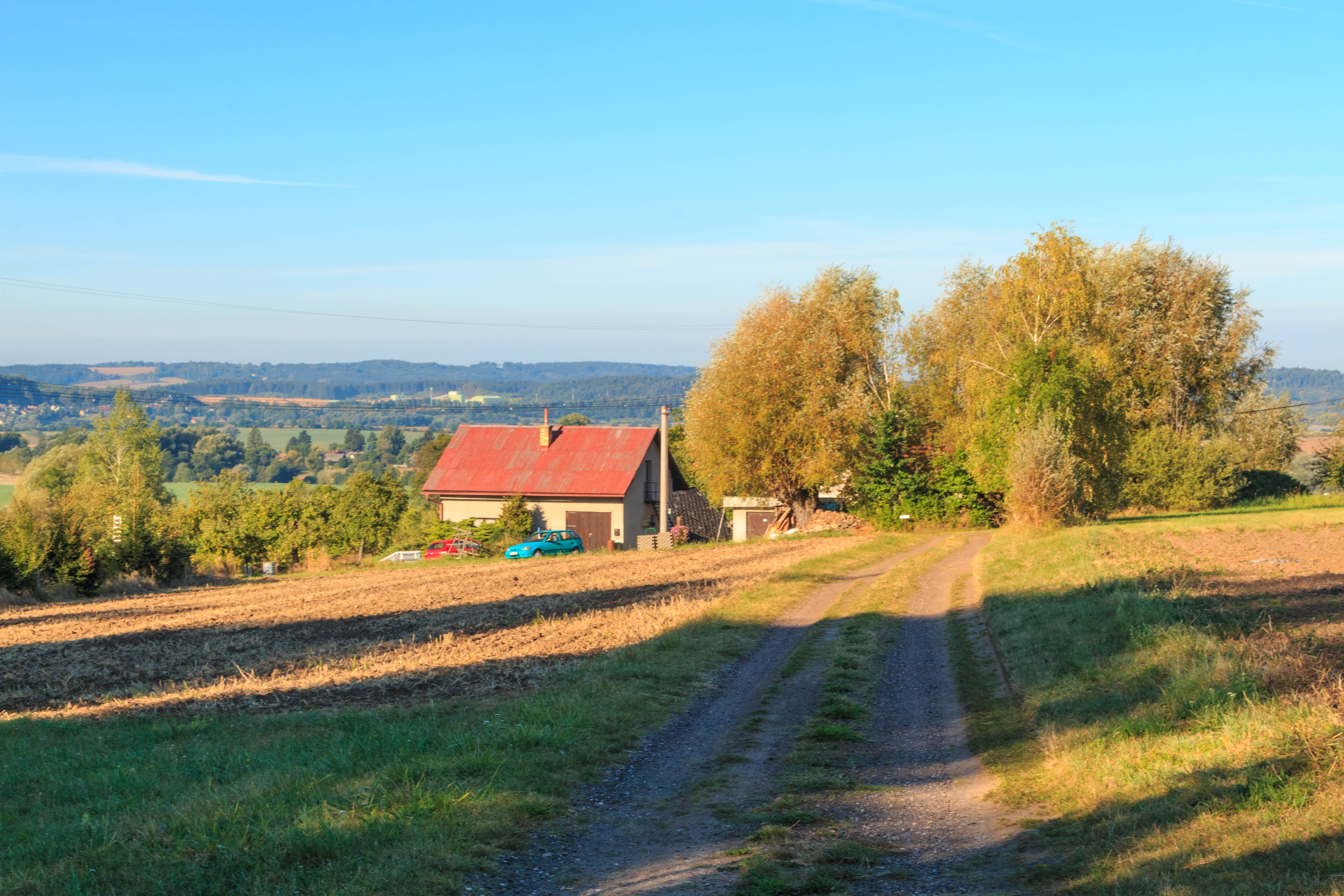 Svatý Petr u Libuně - čp. 40